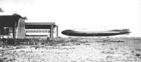 L 54 på vej ind i Toska-hallen i Tønder